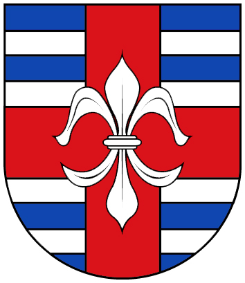 Wappen der Gemeinde Hetzerath Eifel.